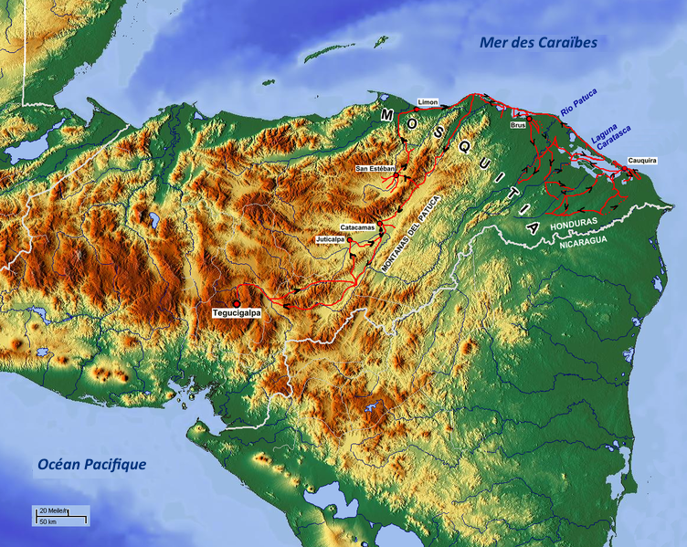 Voyages de Karl Helbig au Honduras